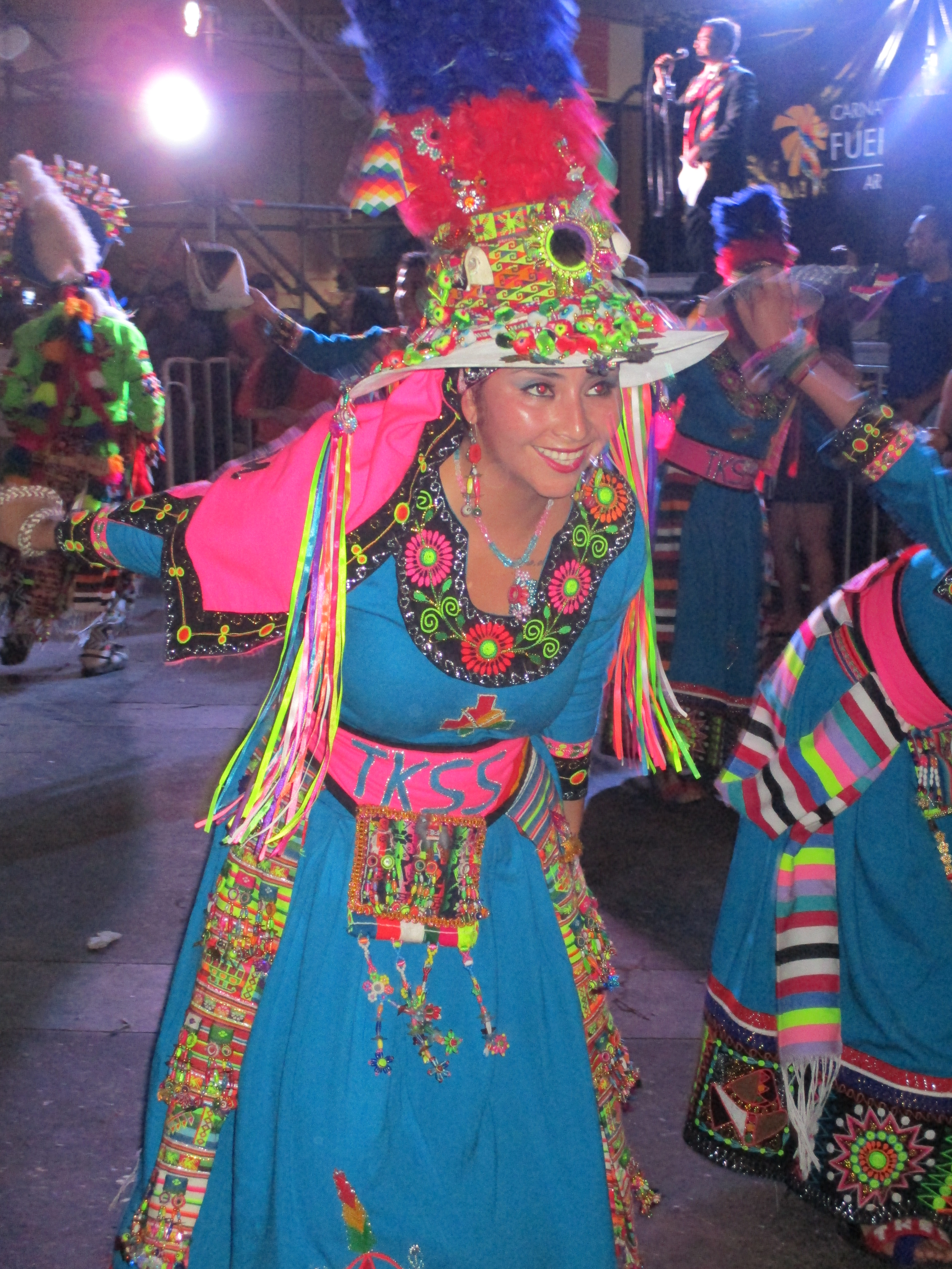 Tinkus San Simón (Carnaval con la Fuerza del Arica 2016)